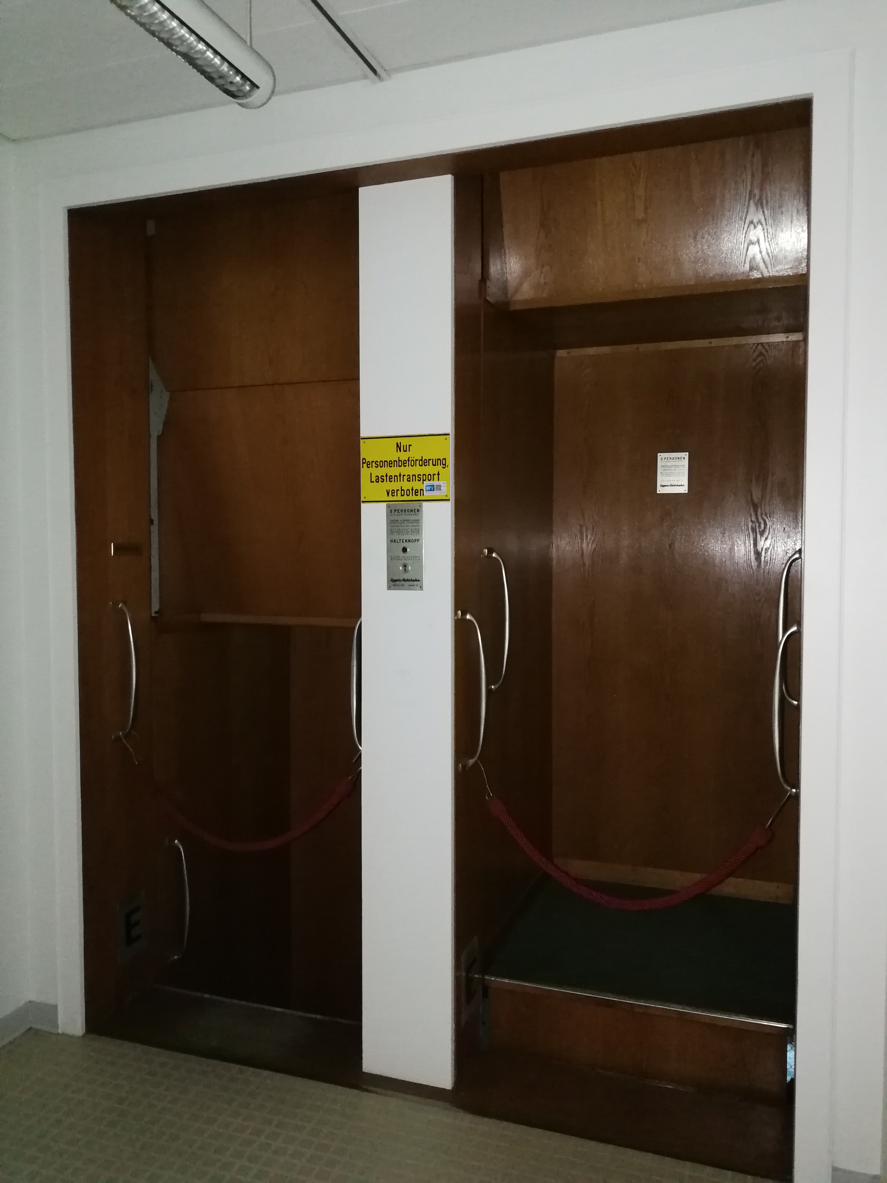 Paternoster von der Firma Eggers-Kehrhahn, Fabrik Nr. 17092, Baujahr 1956 in Göttingen im Gothaer Versicherungsgebäude (Gebäudeabriss für 2020 geplant).